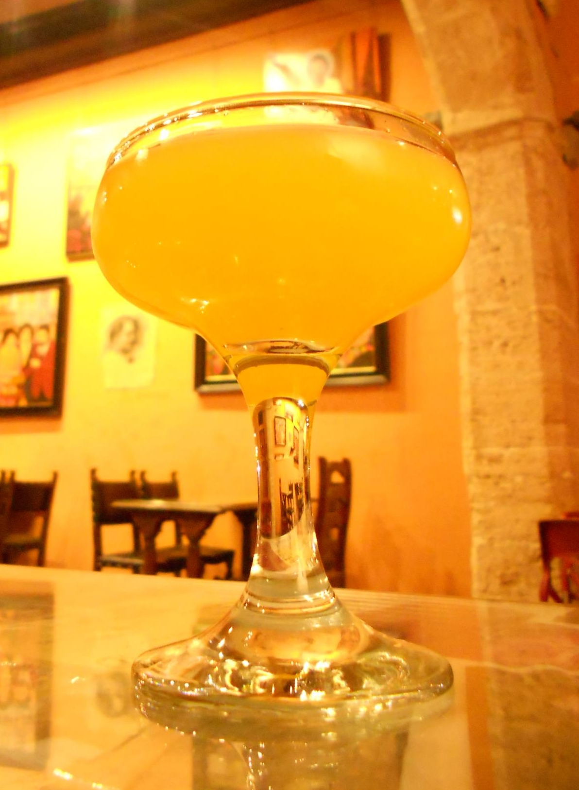 Copa que se utiliza para beber el Agua de Valencia original de Constante Gil.